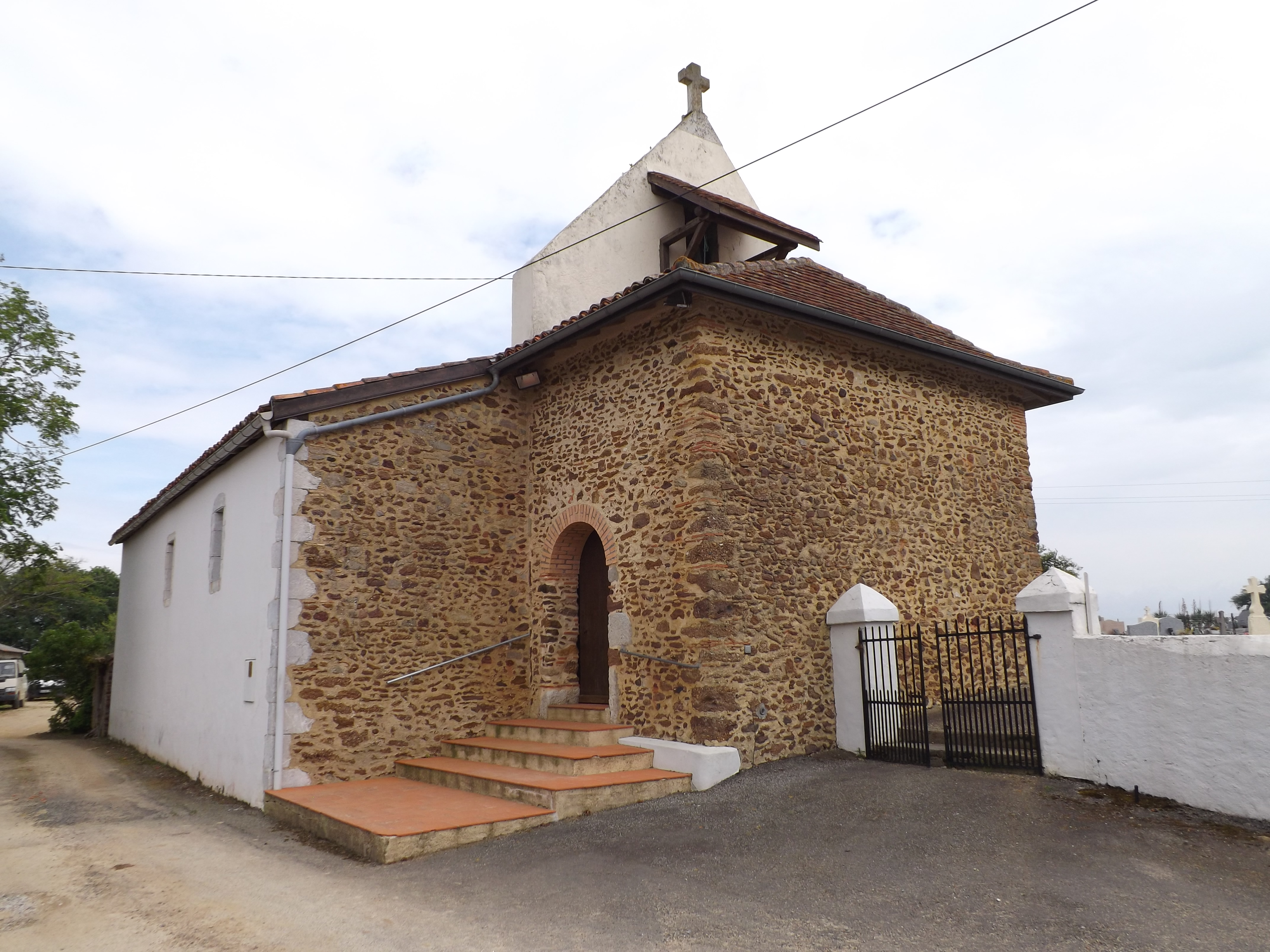 Glèisa de Sent Blasi de Veirias, Shalòssa, Gasconha